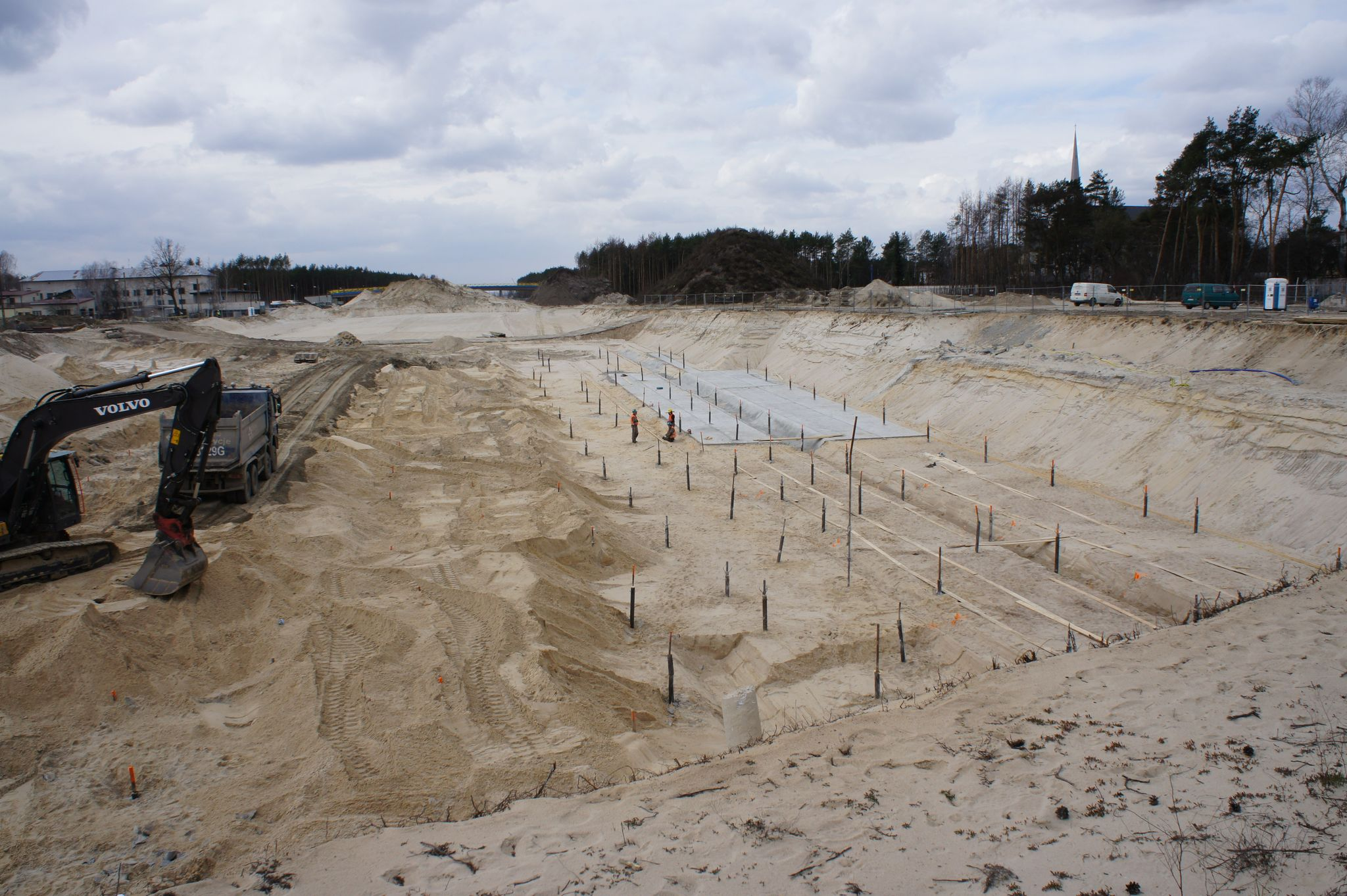 Budowa południowej obwodnicy Warszawy (S2) - okolice ulicy Patriotów.